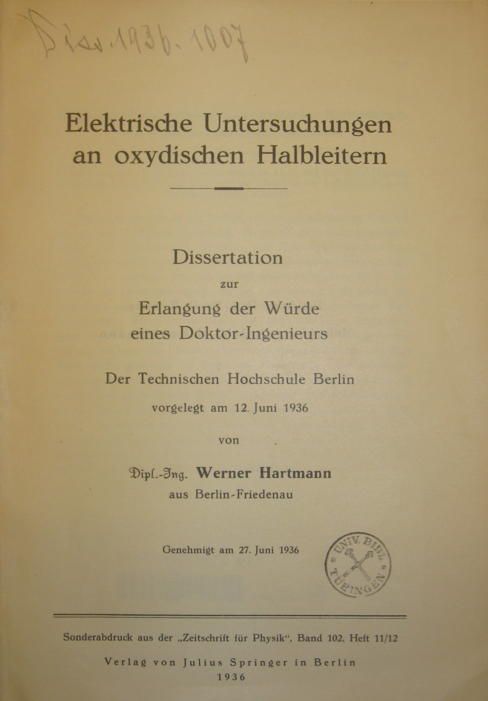 Titelseite von Werner Hartmanns Dissertation von 12. 6. 1936